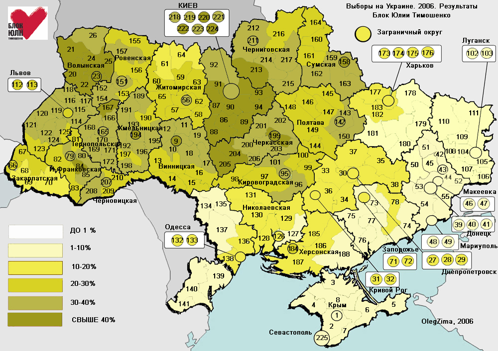 map